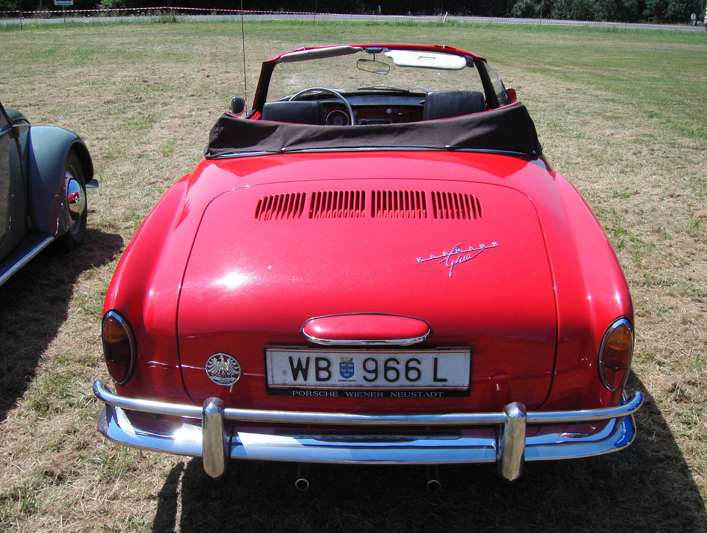 Deitsch: VW Karmann-Ghia Typ 14